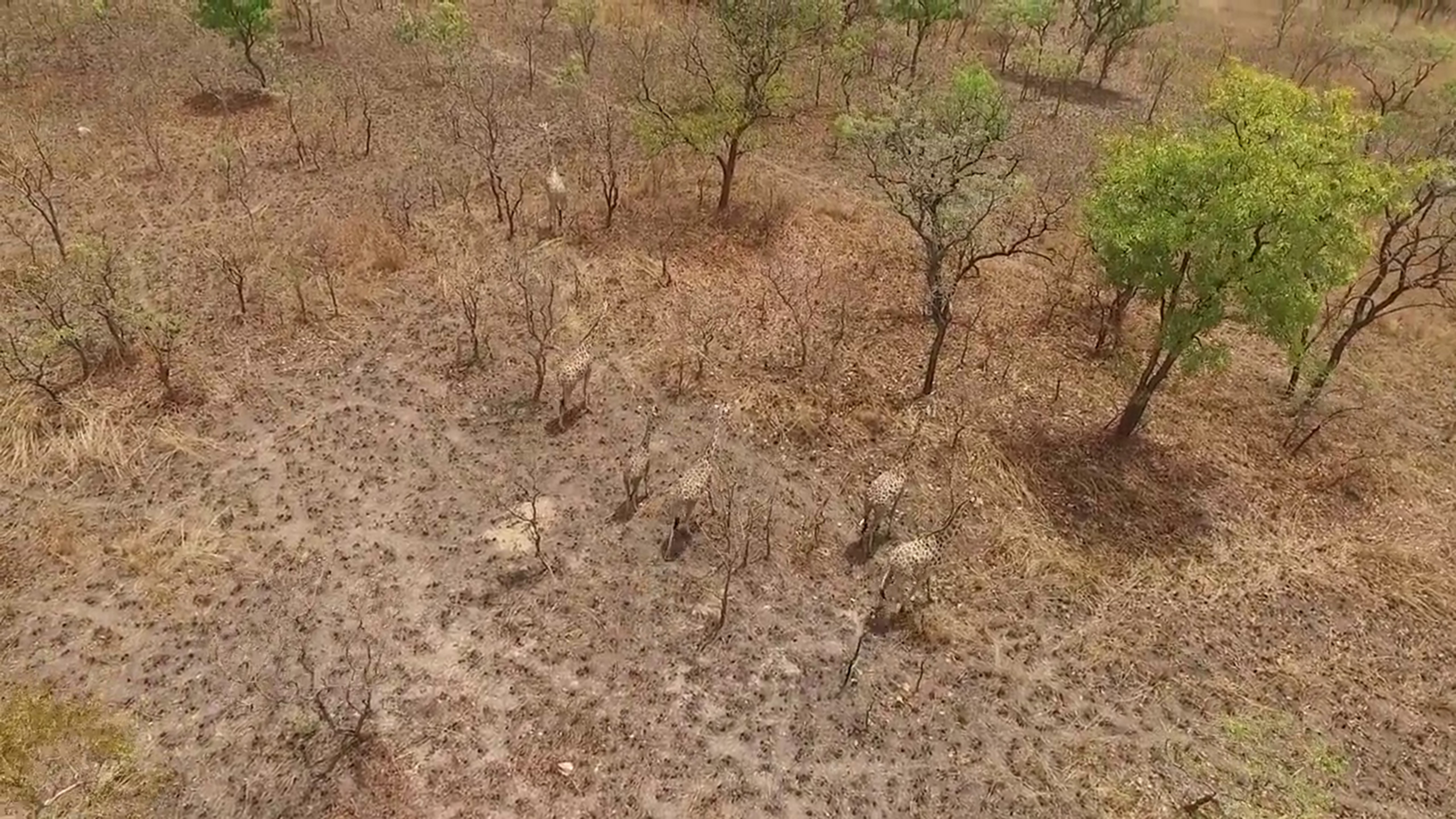 Le parc national de la Benoué est situé dans la région du Nord Cameroun